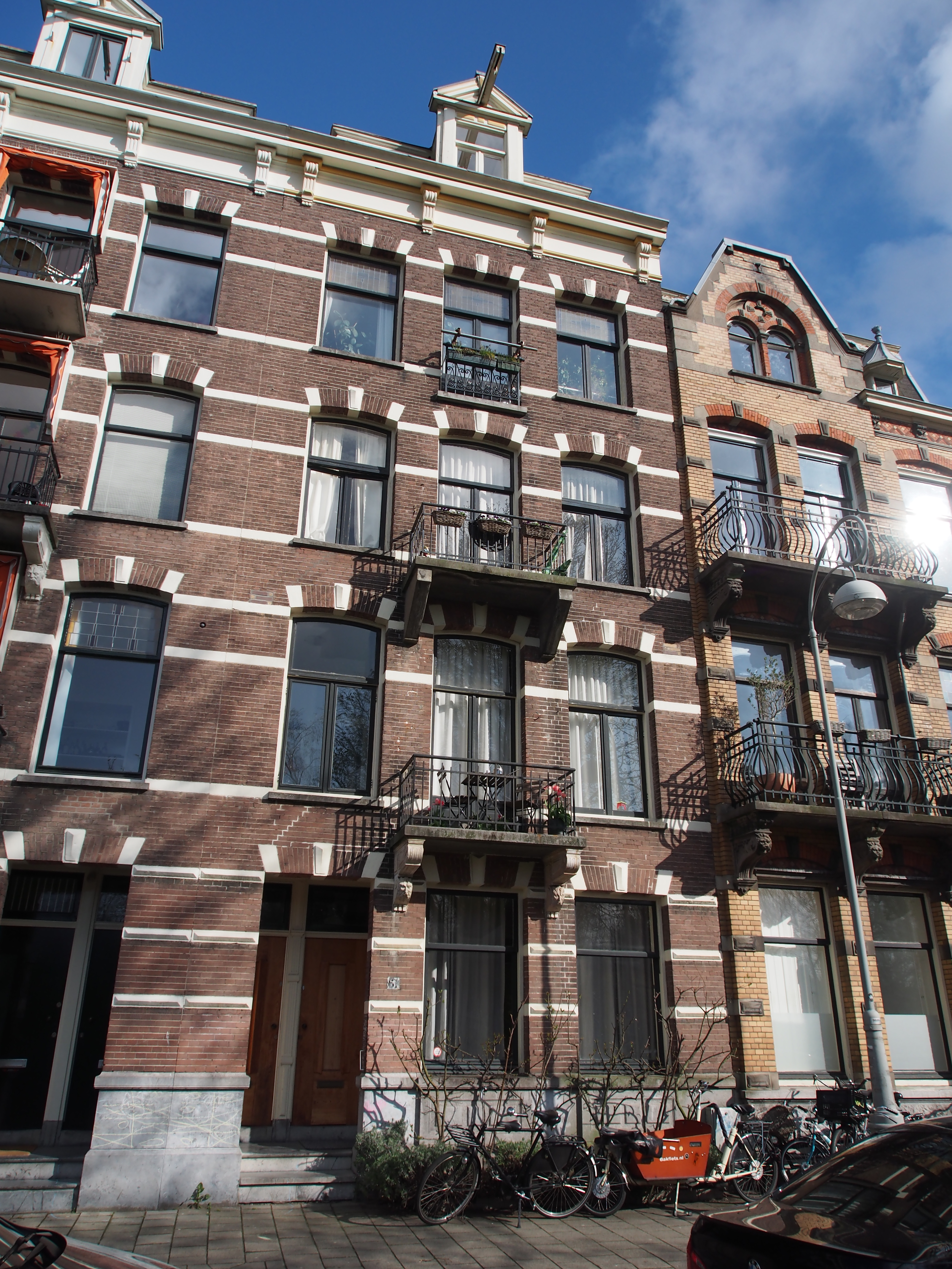 Monument in Amsterdam.